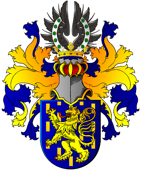 Het stamwapen van het Huis Nassau. Schild: Azuur, bezaaid met blokjes van goud, beladen met een klimmende leeuw van goud, getongd en genageld van keel. Dekkleden: Van azuur, gevoerd van goud. Helmteken: Een vlucht van sabel, komende uit een kroon van goud, beladen met een lint van zilver, aan iedere kant bezaaid met vijf Lindebladeren van sinopel.